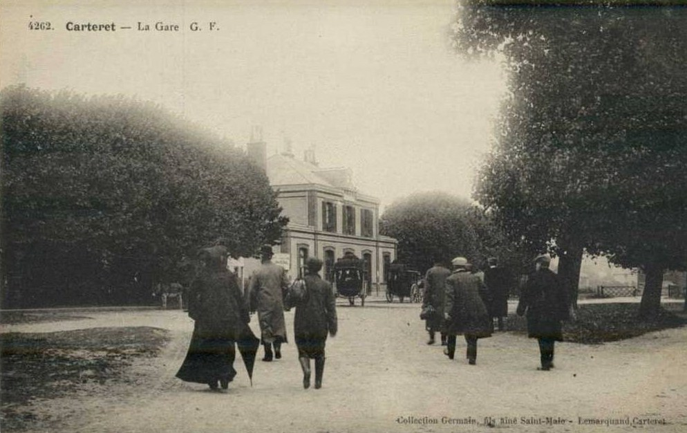 gare de Carteret à Barneville-Carteret, terminus de la ligne de Carentan à Carteret.